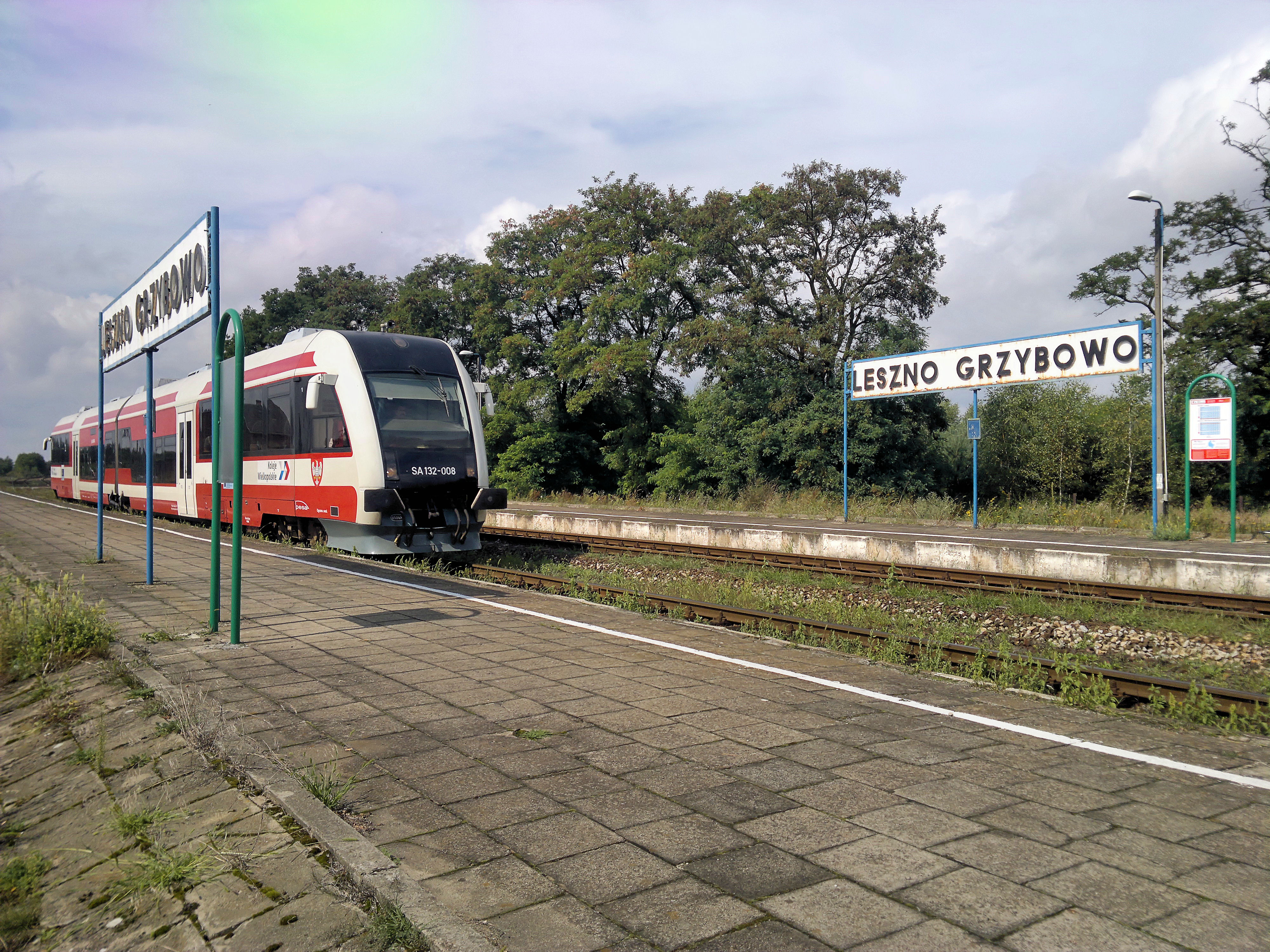 Peron przystanku kolejowego Leszno Grzybowo